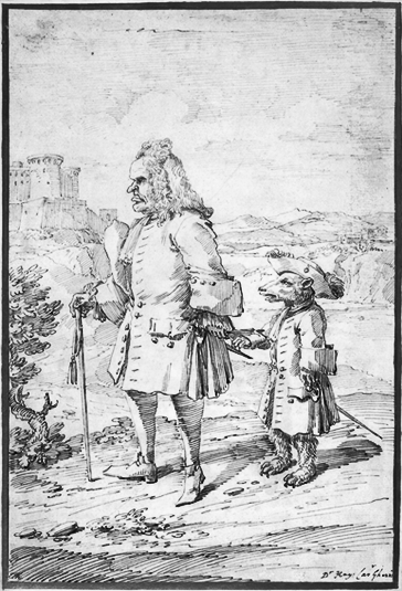 Caricatura del Dr. James Hay como guía de los osos, por Pier Leone Ghezzi